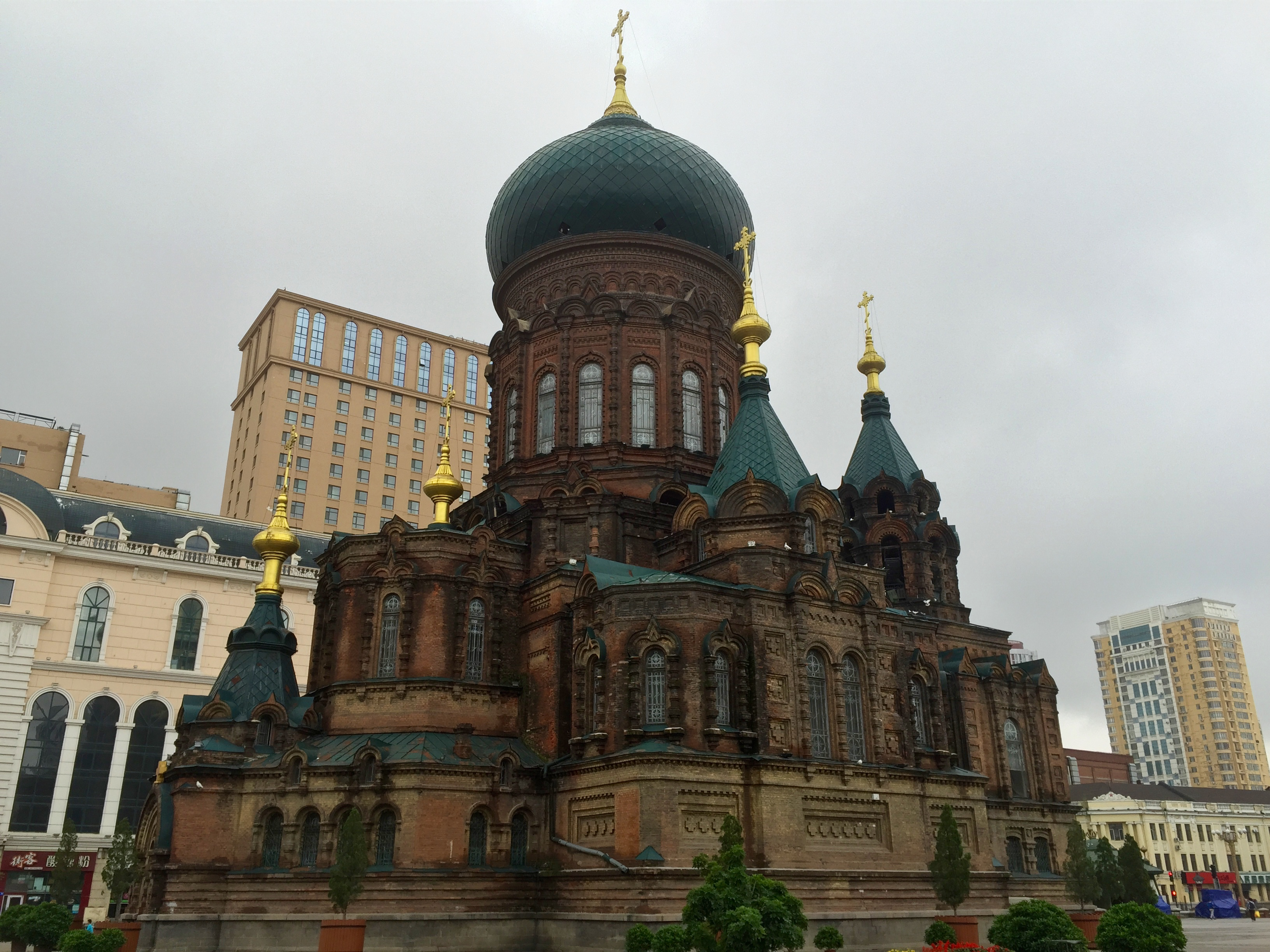 聖索菲亞大教堂